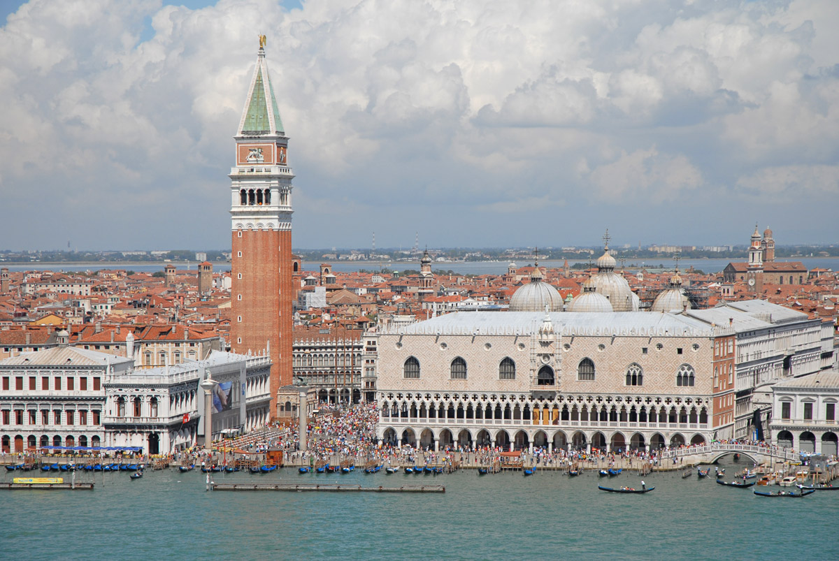 Images de Venise en août 2007